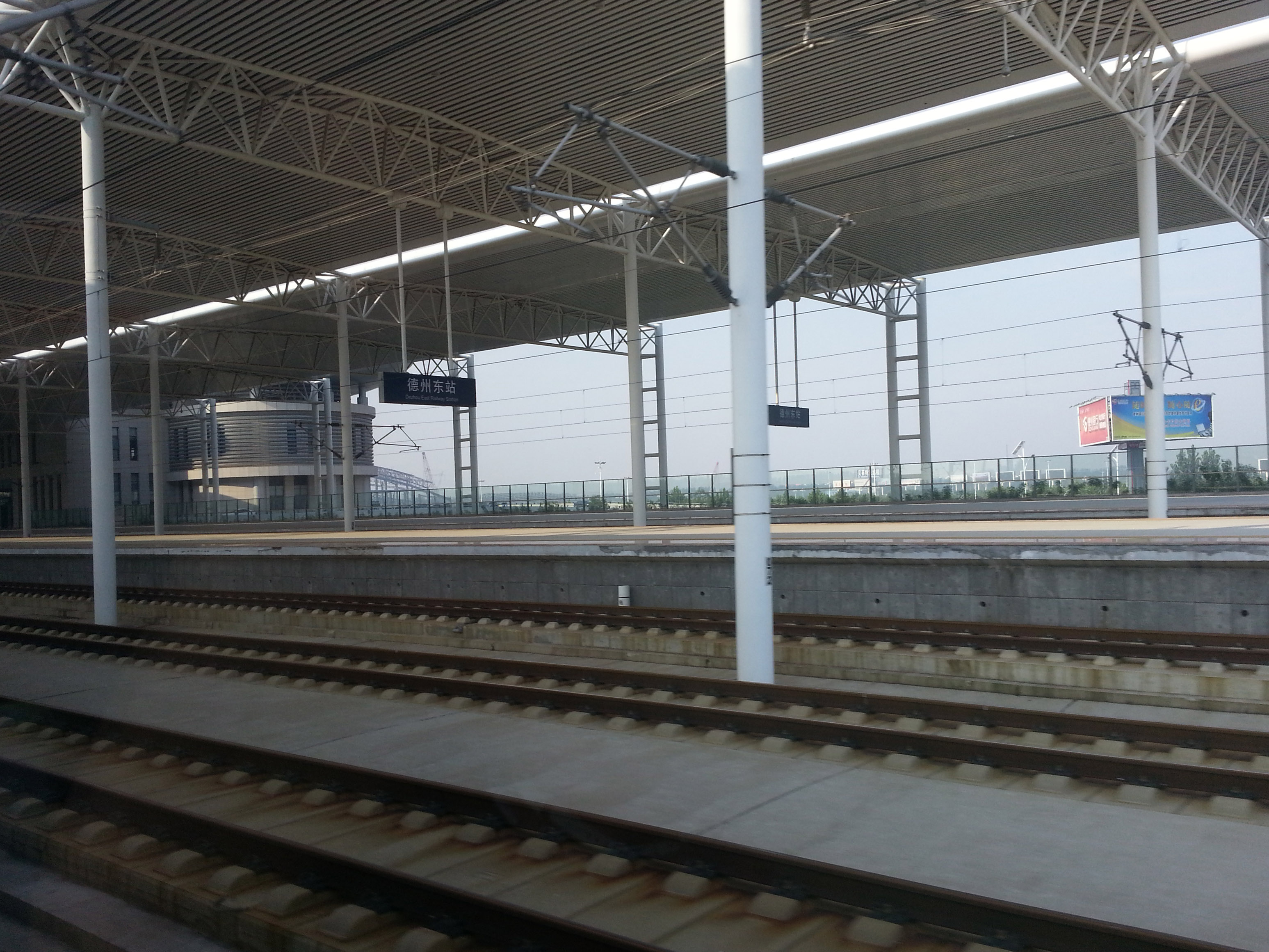 德州东站轨道